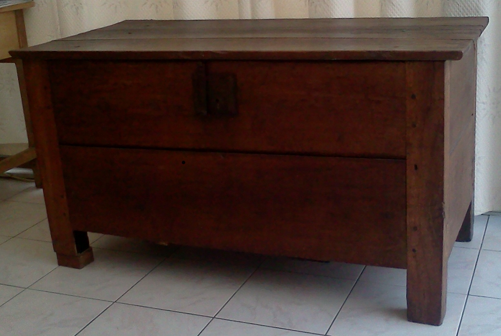 Maie à pain - Meuble de famille.